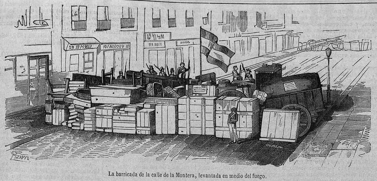 La barricada de la calle de la Montera, levantada en medio del fuego.